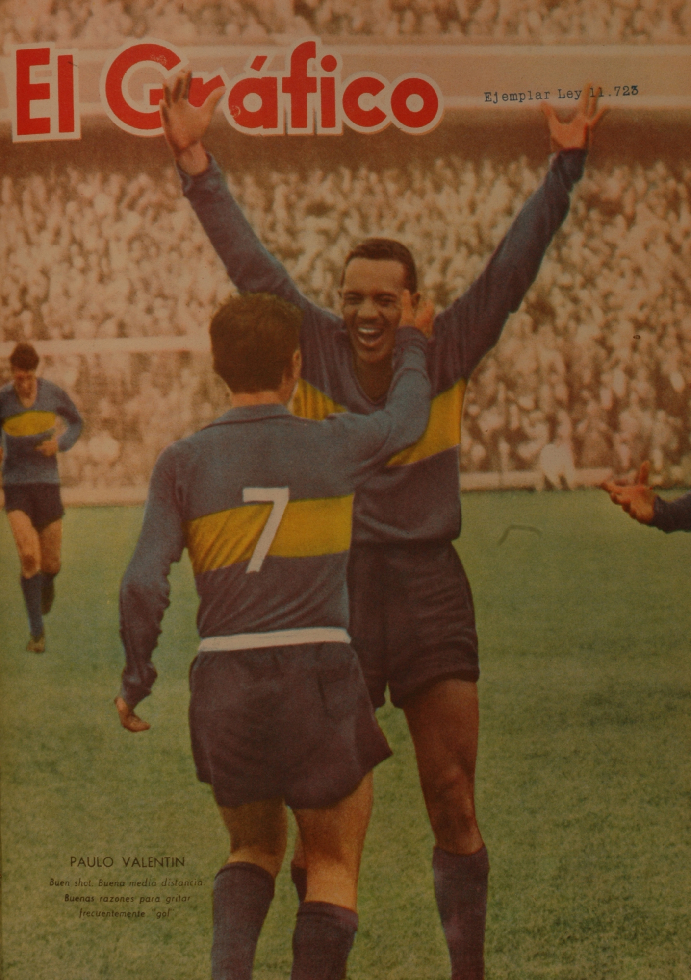 El Grafico del 17 de Agosto de 1960. Edicion 2134